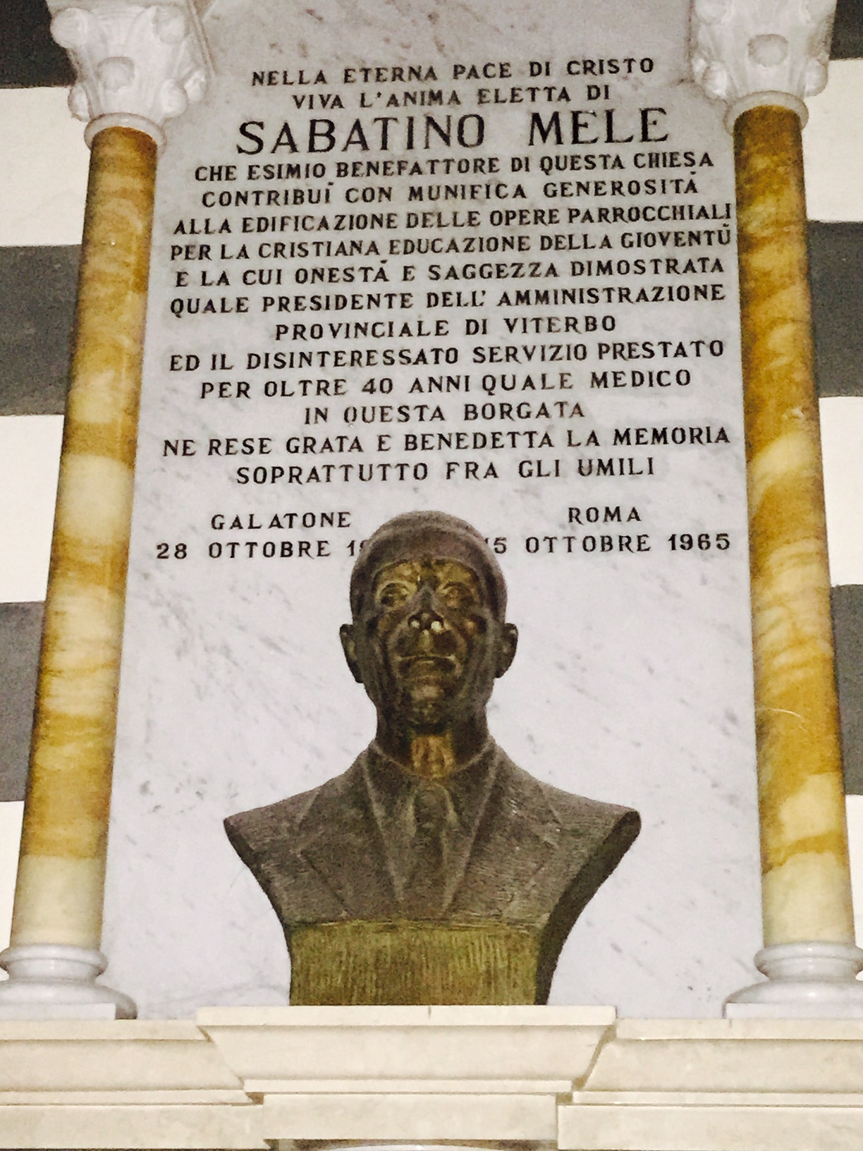 Il busto e l'iscrizione in memoria del Dott. Sabatino Mele all'interno della Parrocchia di Orte Scalo